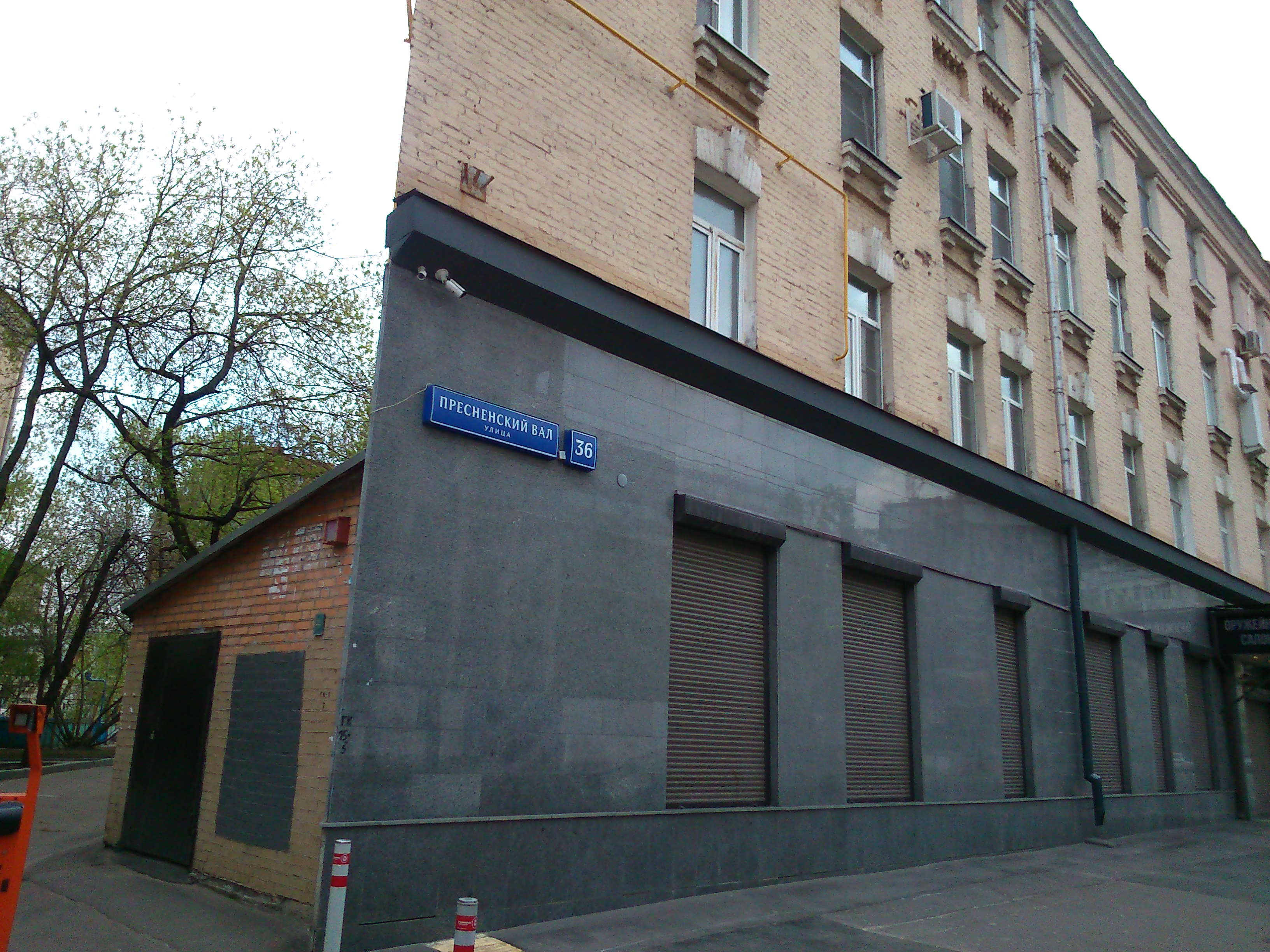 "Плоский дом". Дом по адресу Москва, Пресненский Вал, 36 при определённом ракурсе кажется плоским.